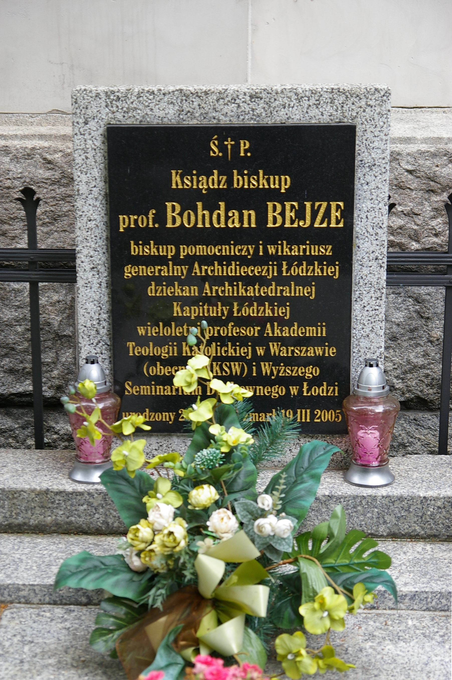 Grób Bohdana Bejze na Starym Cmentarzu w Łodzi